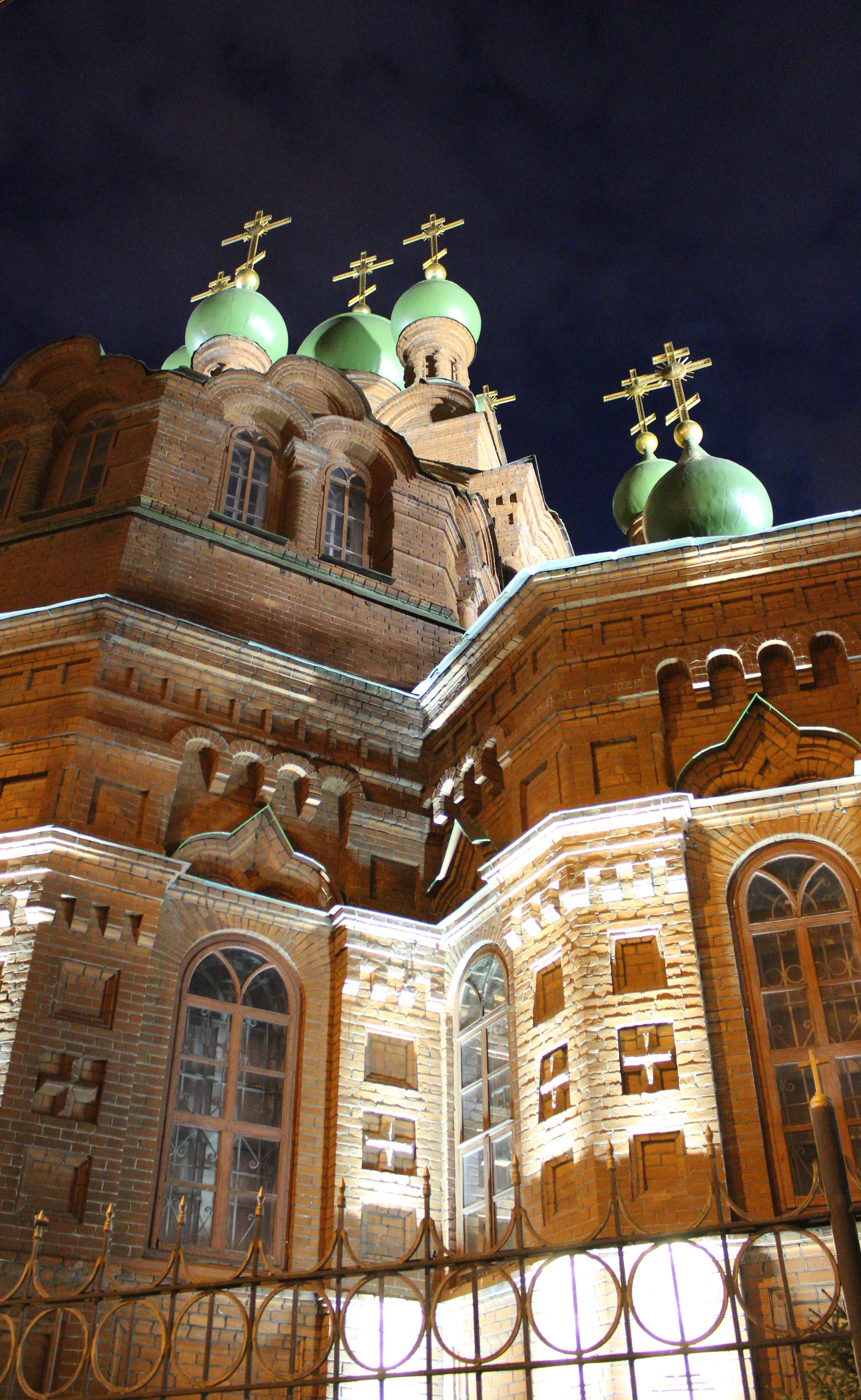 Троицкая церковь (Челябинская область, Челябинск, кирова улица, 60)